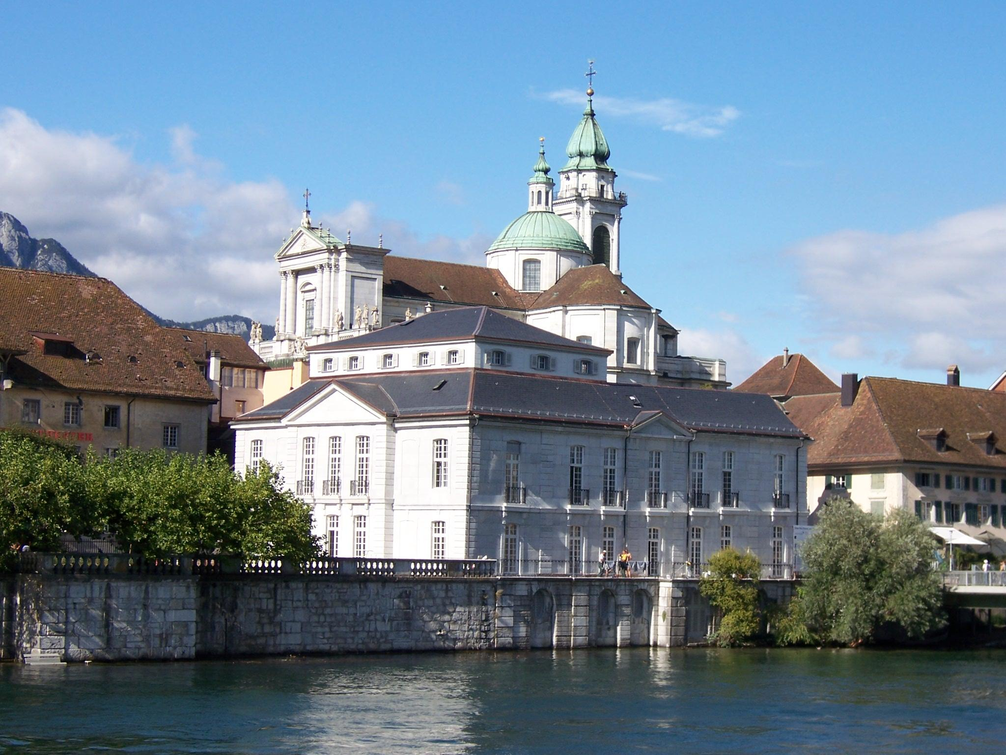 Palais Besenval und St.-Ursen-Kathedrale am linken Aareufer in Solothurn (Kanton Solothurn, Schweiz) eigene Aufnahme vom 4. September 2006